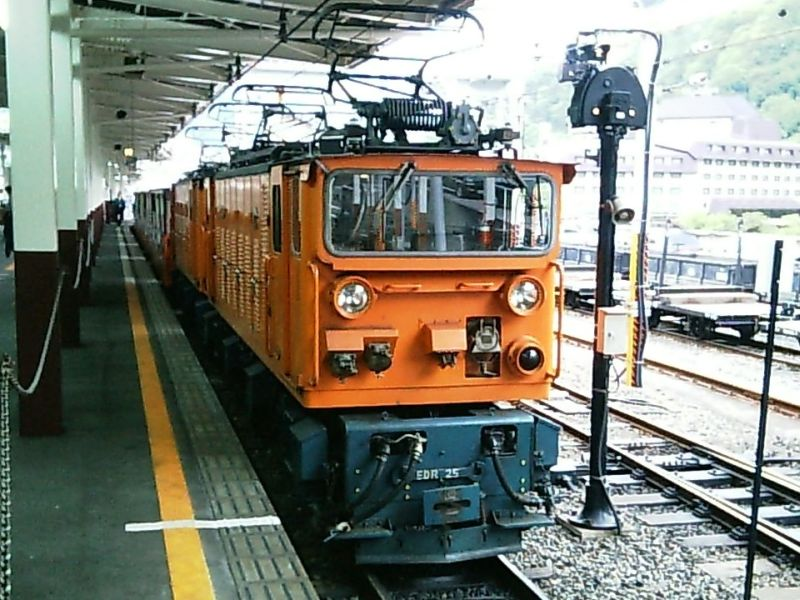 黒部峡谷鉄道 EDR形電気機関車 撮影者：tamikiku 撮影日：2004.5.3 撮影地：宇奈月駅 category:鉄道列車画像